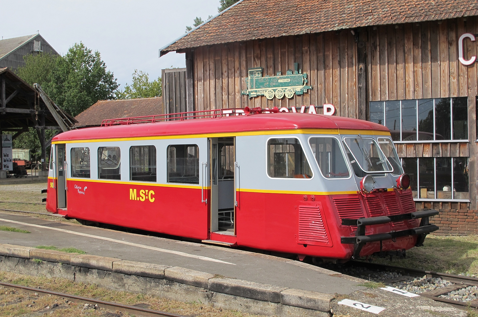 L'autorail Billard X 901 du Chemin de fer touristique de la Sarthe le 16 septembre 2018.